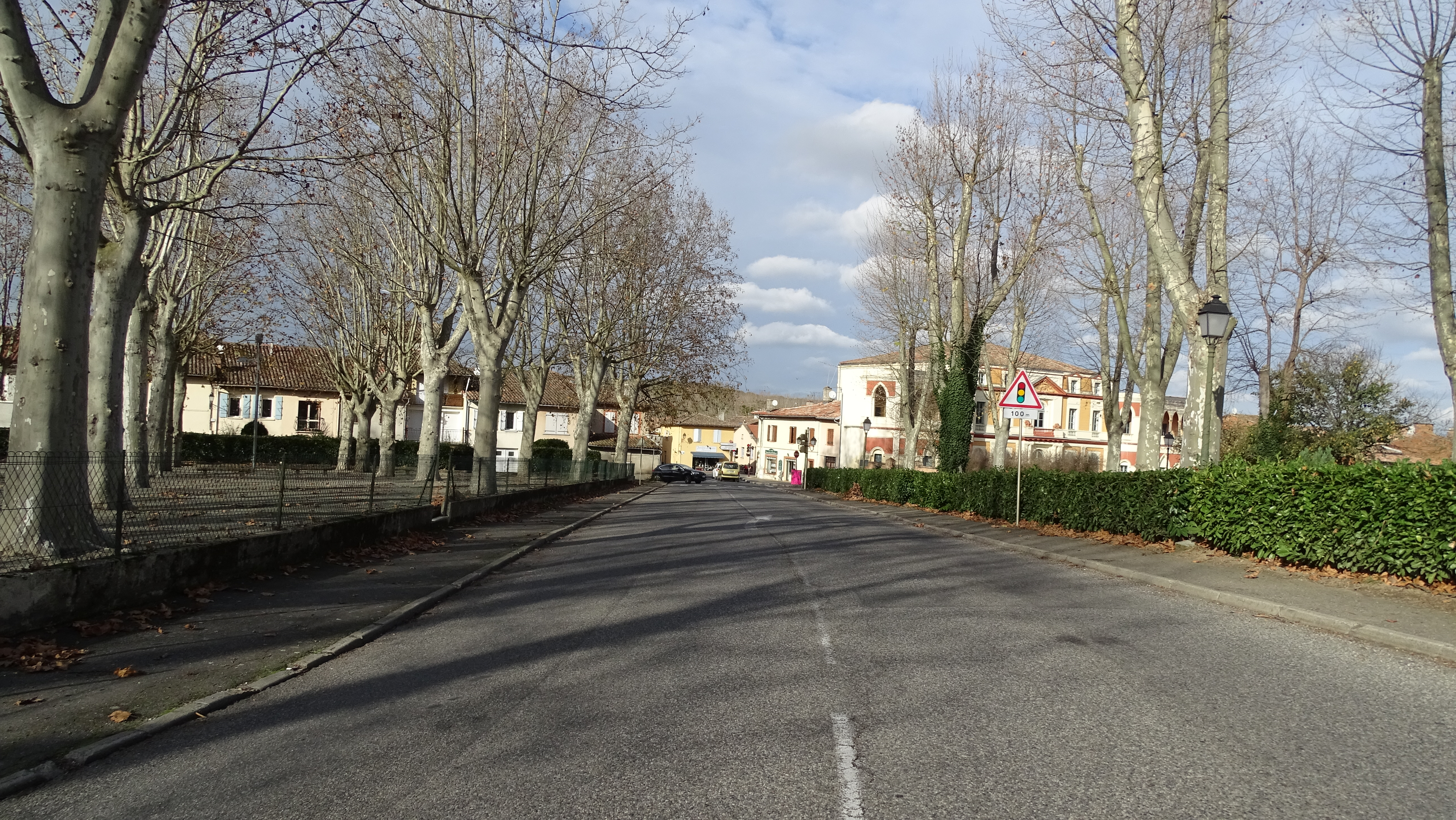 Lévignac-sur-Save (Haute-Garonne, France).